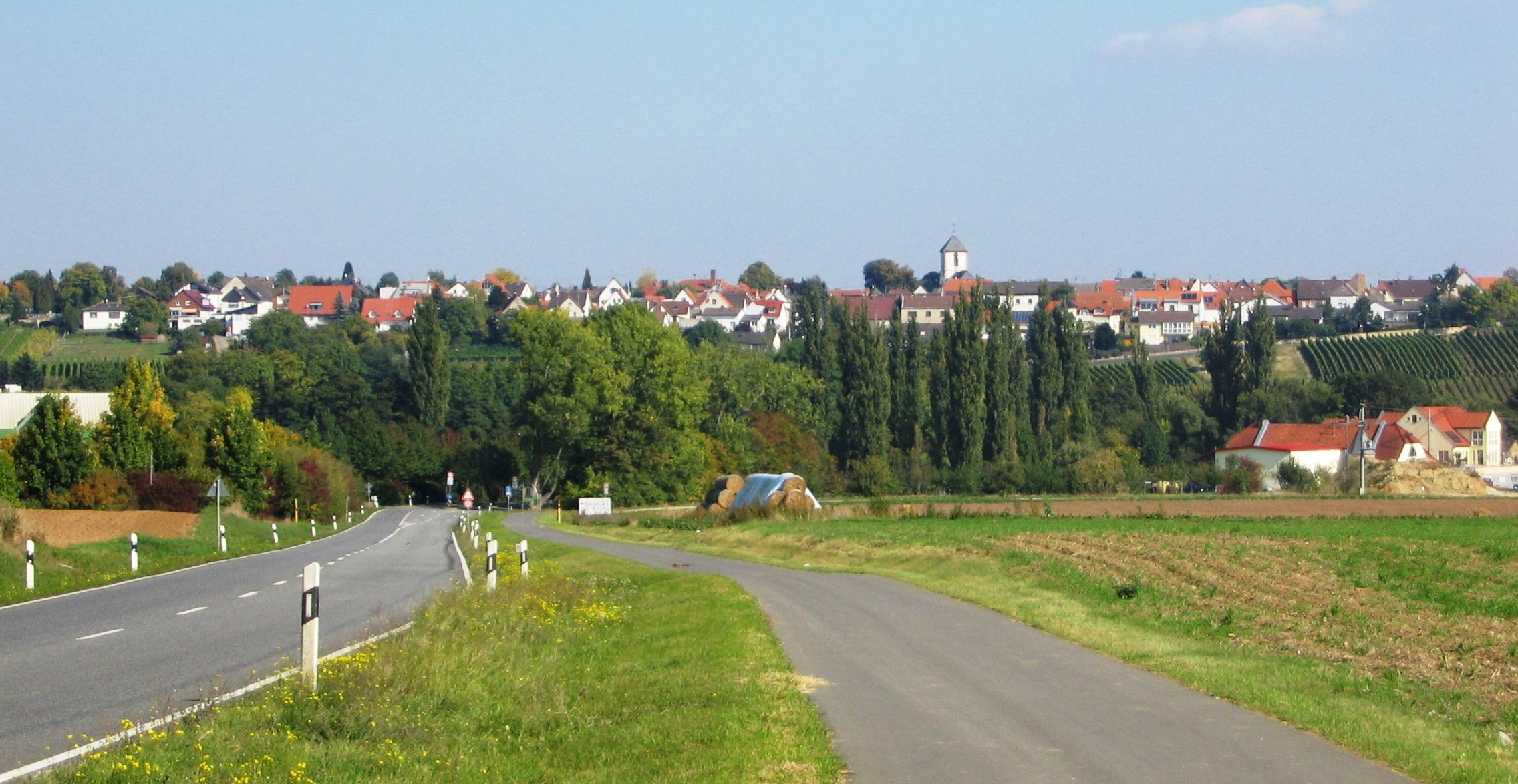 Wicker und Bundesstraße 40 aus Westen gesehen. Die Bundesstraße zieht sich mit bis zu 10 % Steigung den Wickerer Berg zum rechten Bildrand hinauf.